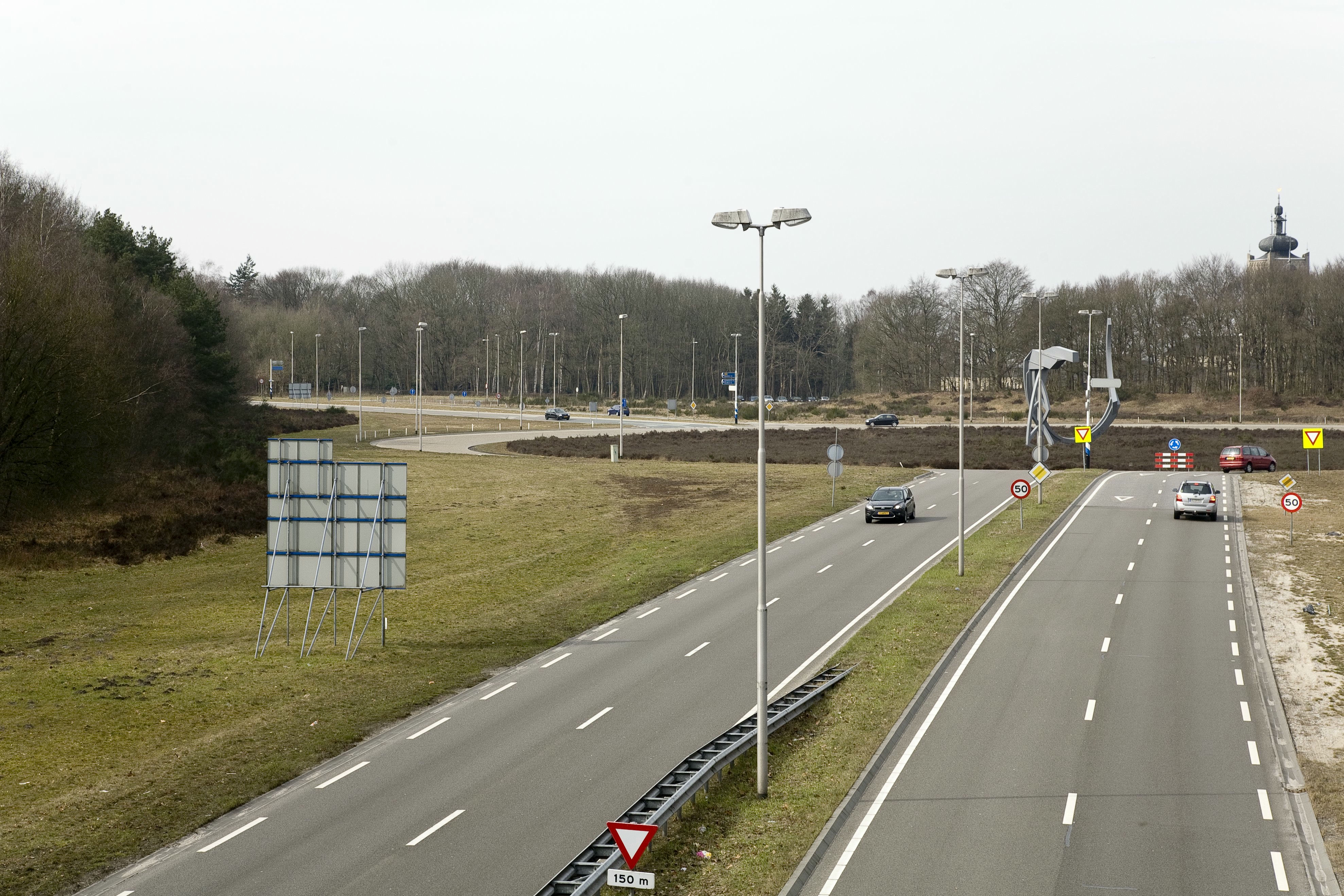 Rotonde/ Verkeersplein: Overzicht van het verkeersplein de Stichtse Rotonde, gezien vanaf fiets- en voetgangersbrug over de N221 (opmerking: Gefotografeerd voor Wegh der Weegen, ontwikkeling van de Amersfoortseweg 1647-2010)